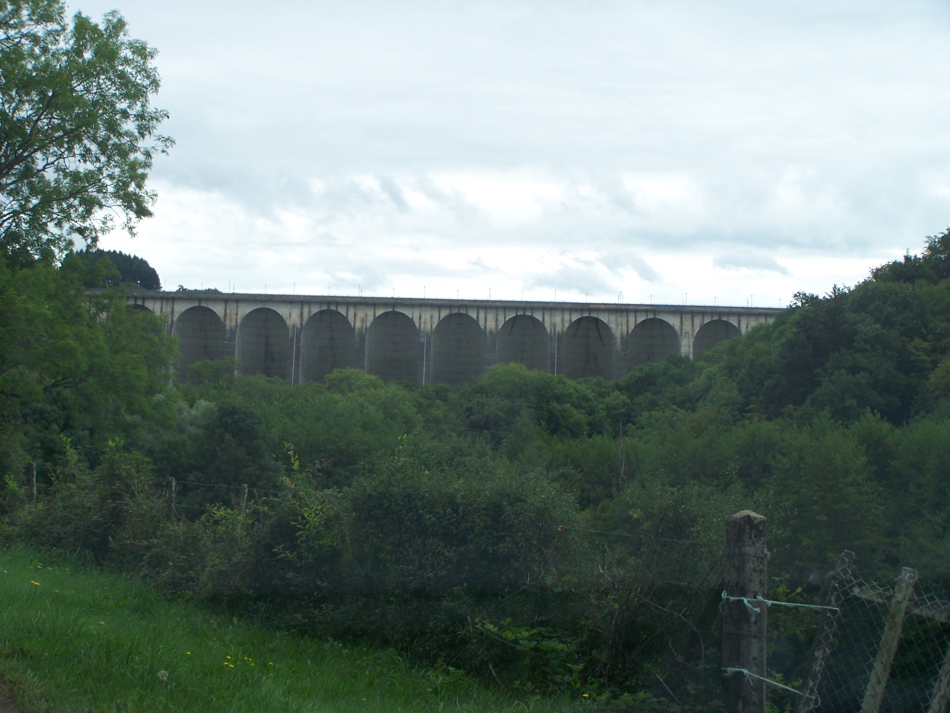 Vue en aval du barrage hydroélectrique du lac de Pannecière depuis le hameau de L'Huis-Mignot (Nièvre, France) en août 2011.